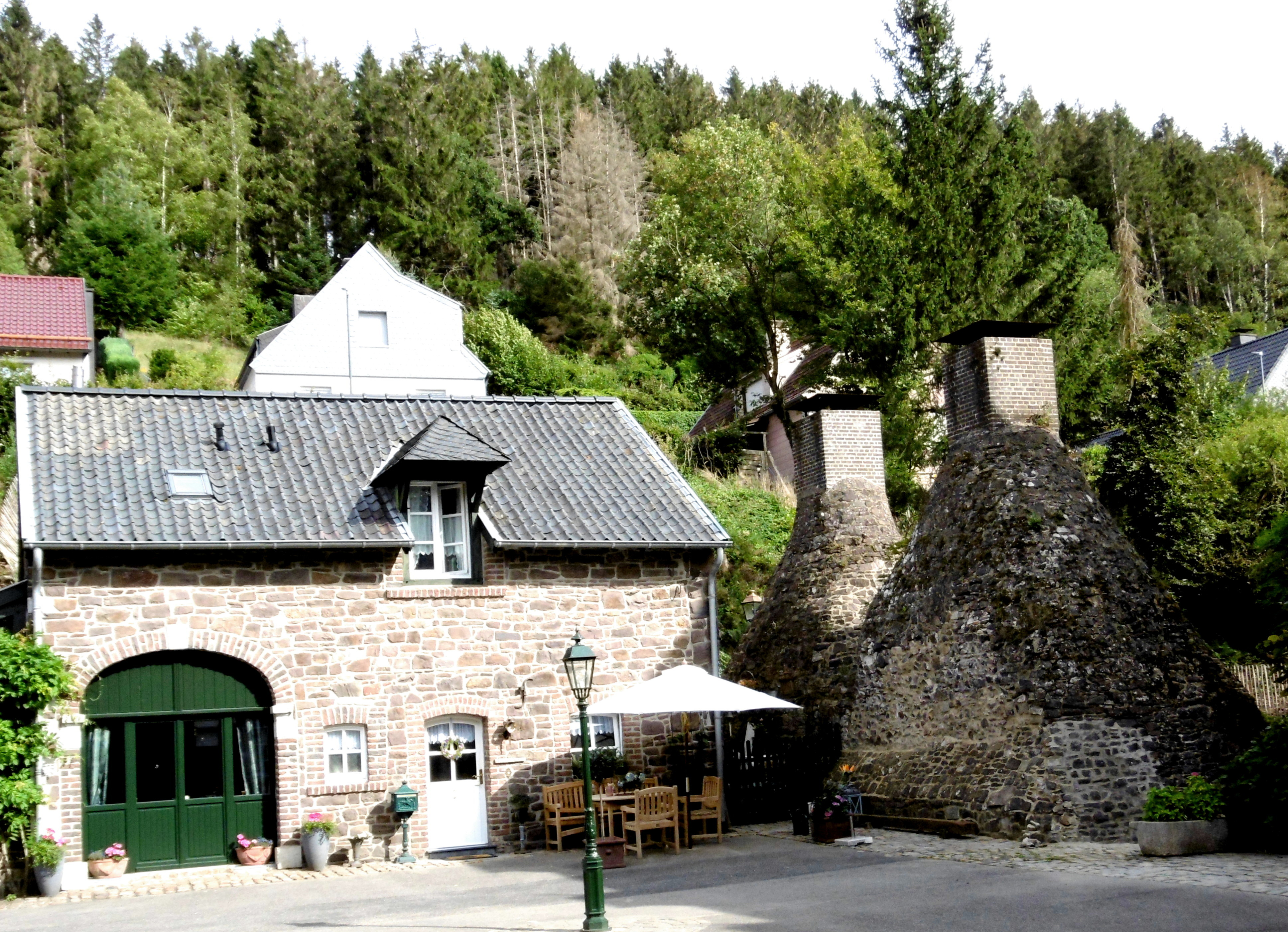 Neuenhammer Stolberg, Haus-Nummer 5 und zwei historische Schmelzöfen